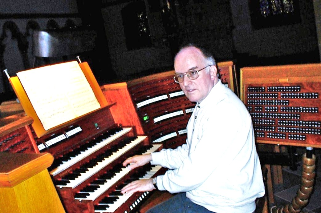 Helmut Peters, am Generalspieltisch der Domorgel im Paderborner Dom